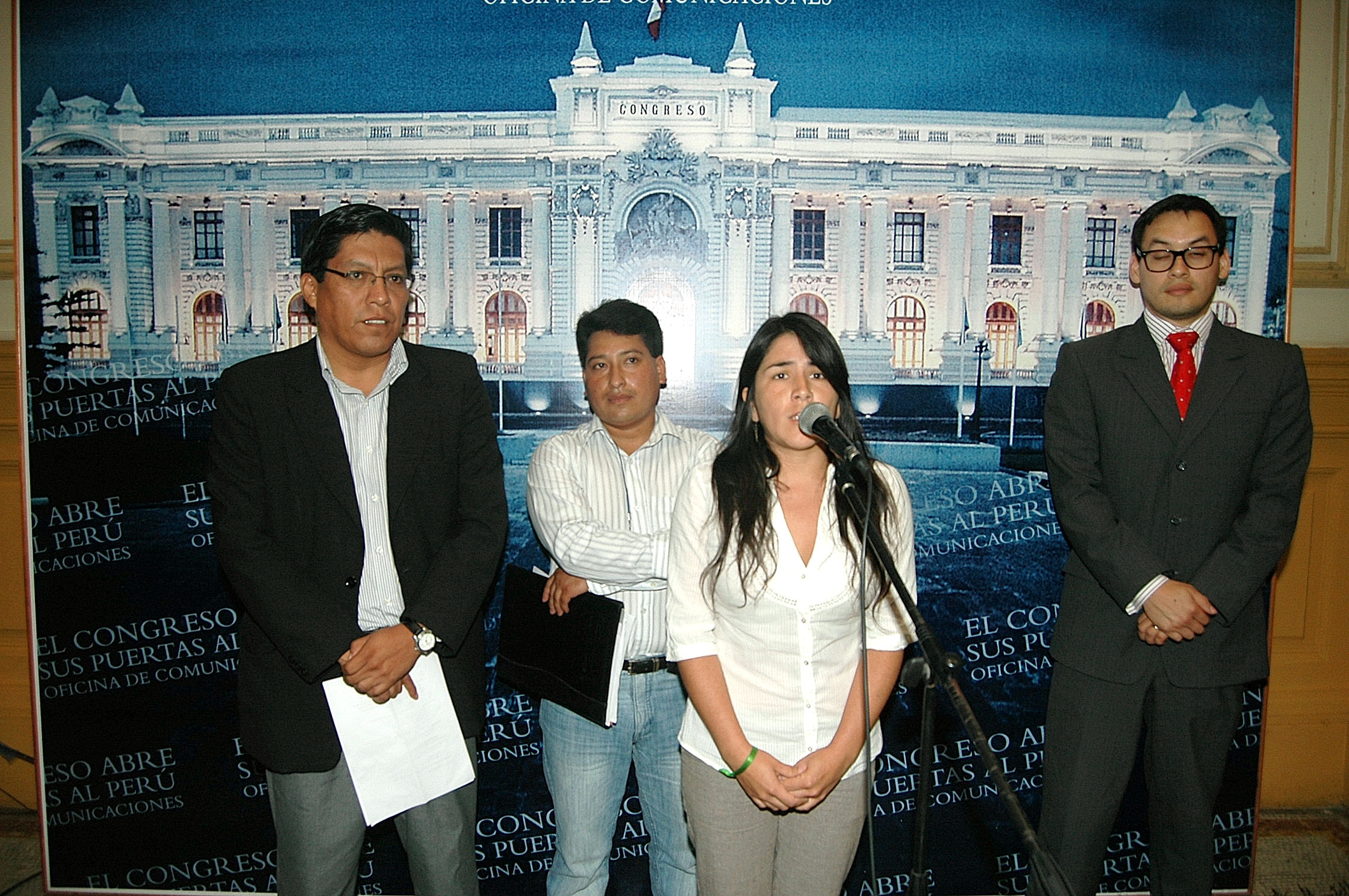 Sobre una propuesta de ley de moratoria temporal de creación de universidades informó hoy, en conferencia de prensa en el Hall de los Pasos Perdidos del Palacio Legislativo, el parlamentario Vicente Antonio Zeballos Salinas.